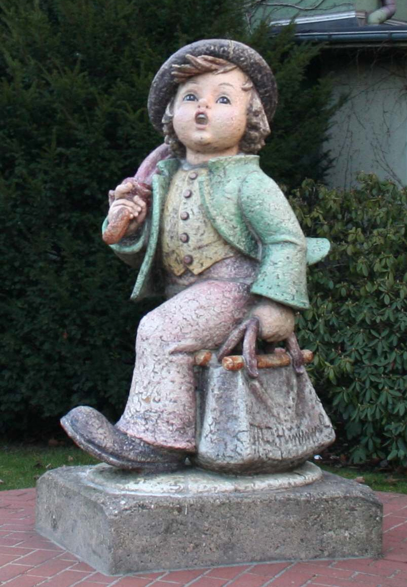 Statue einer Hummelfigur vor der Porzellanfabrik W. Goebel in Rödental, Landkreis Coburg